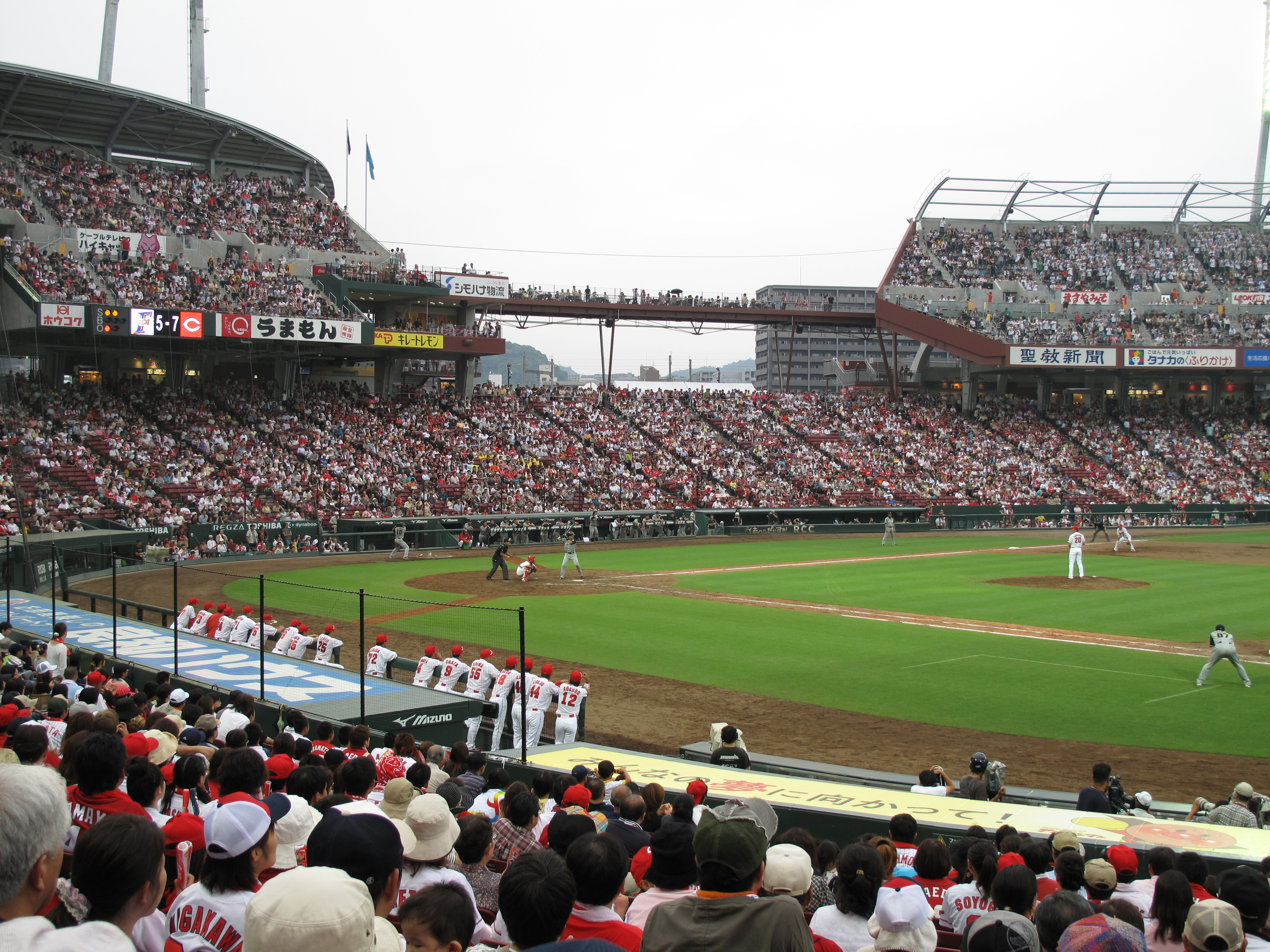 2009年プロ野球（NPB）日本生命交流戦 広島東洋カープ対北海道日本ハムファイターズ戦を１塁側内野スタンドから撮影